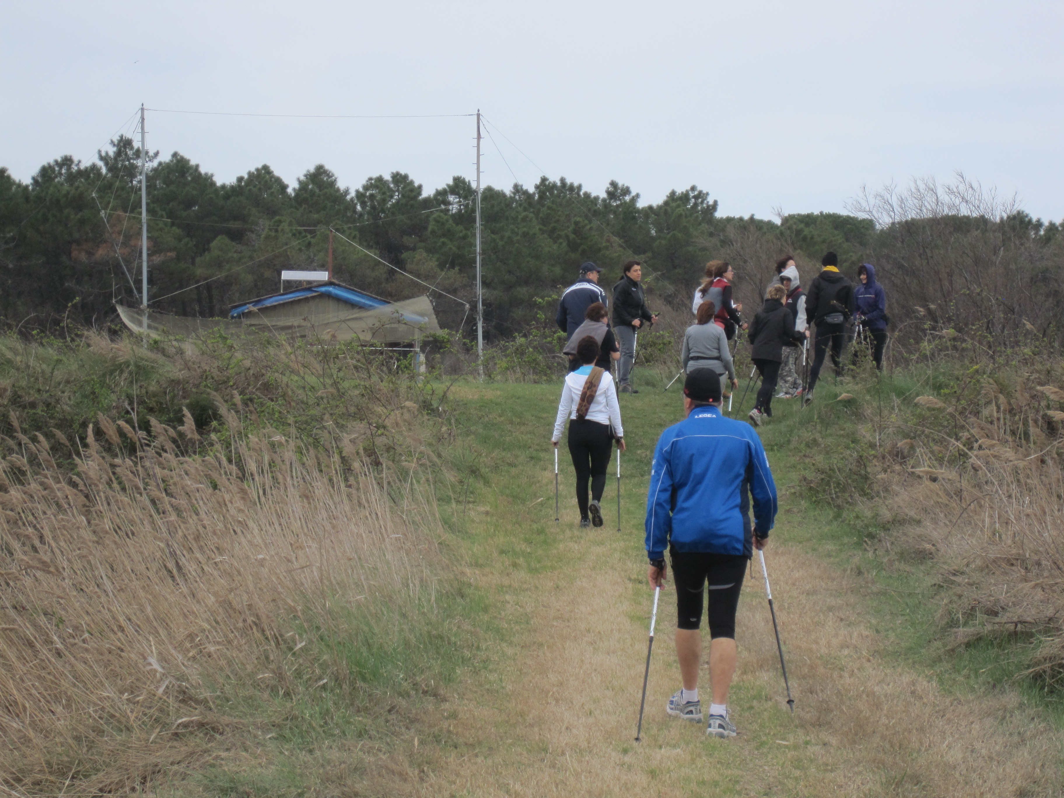 Lido di Classe: gruppo di persone in passeggiata nordic walking